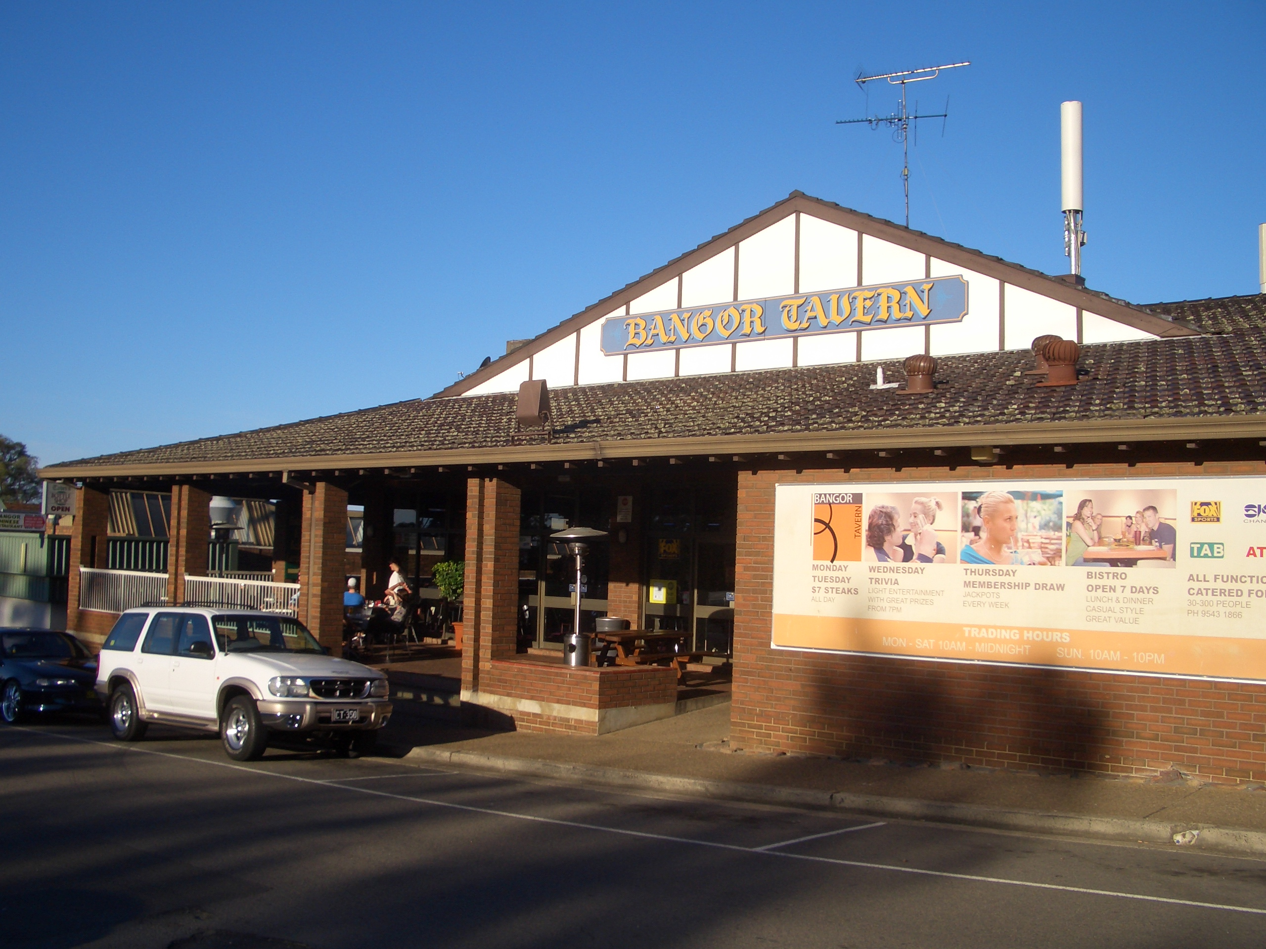 Bangor_Tavern